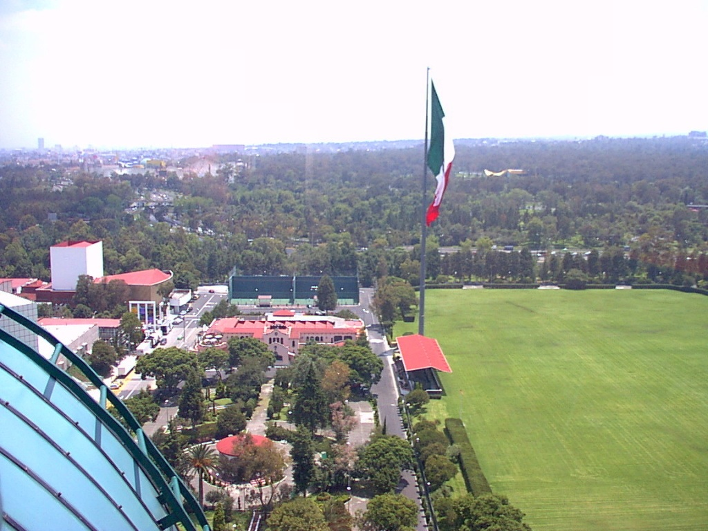 Campo Marte, Ciudad de México.